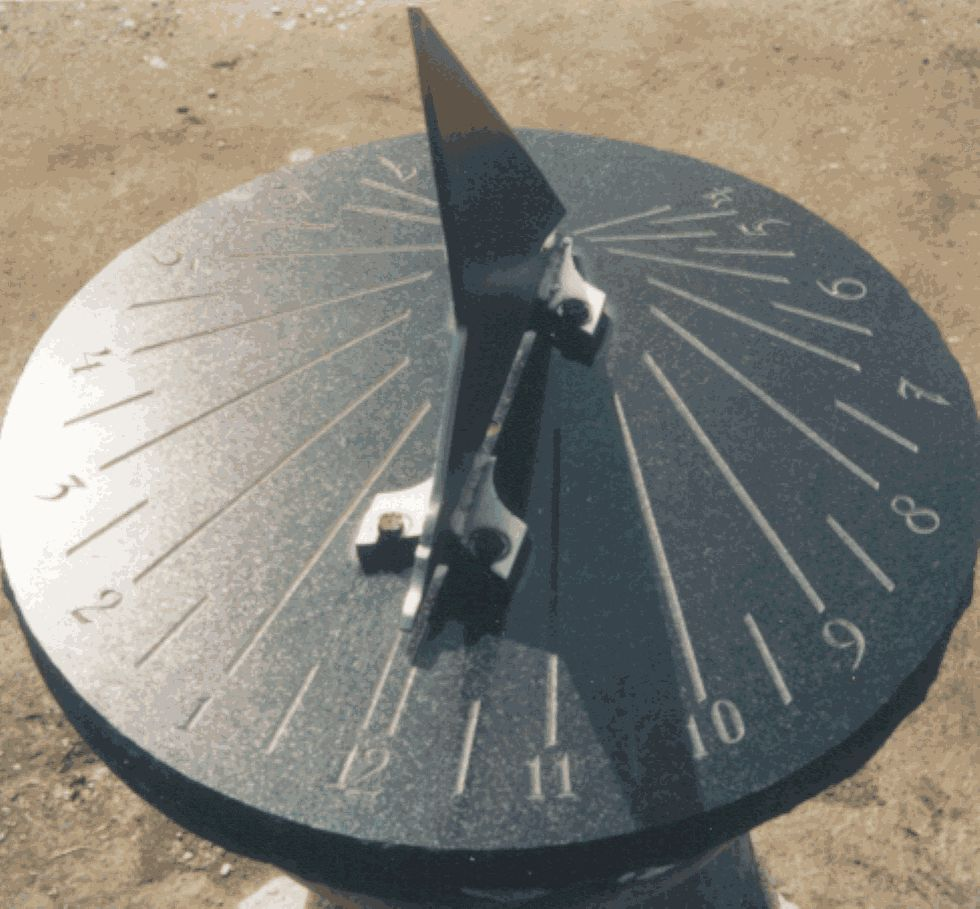 Horizontale Sonnenuhr auf Tisch, für WOZ